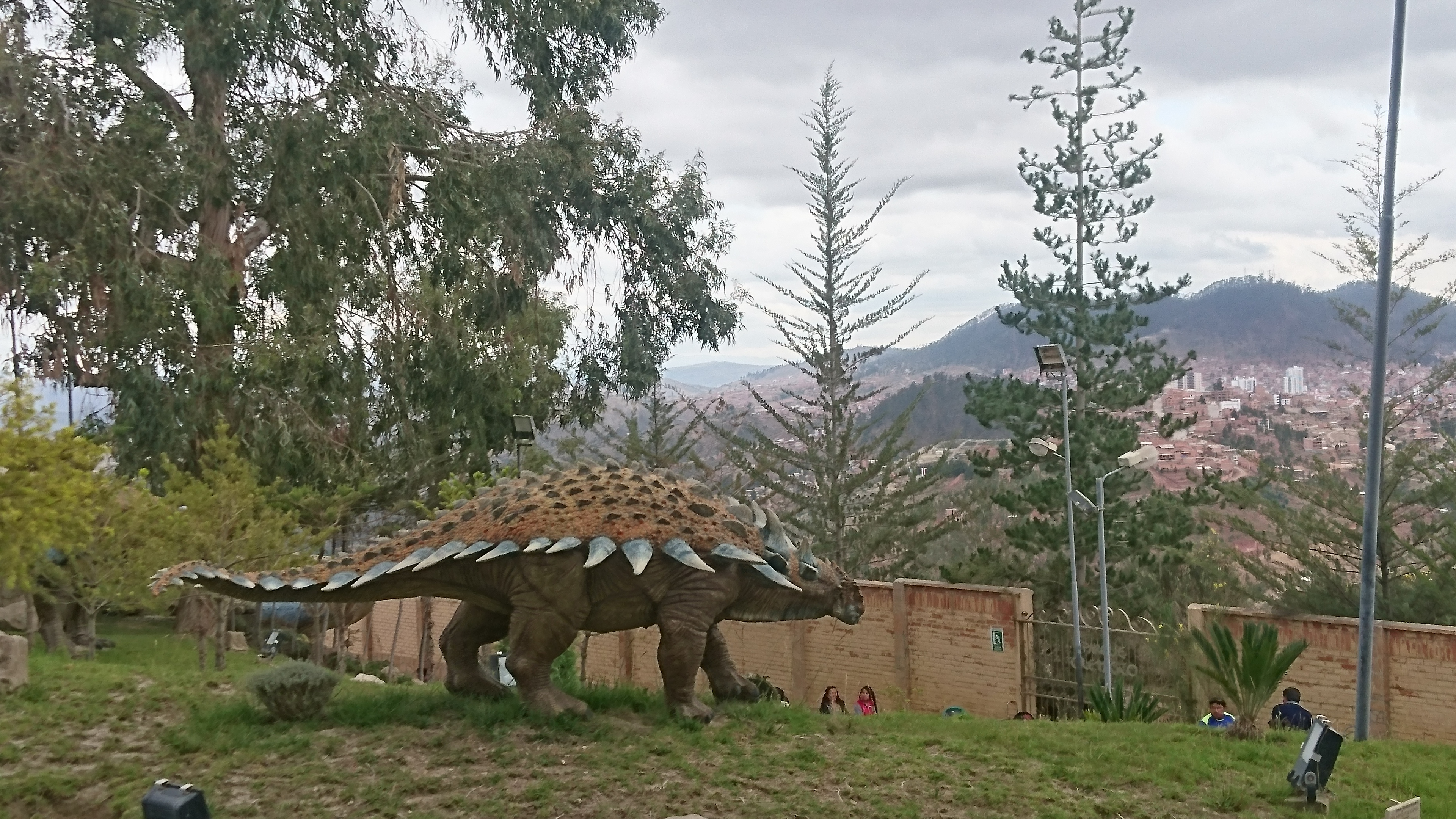 Cerro de Cal Orcko de la localidad de Quila Quila This medium shows the protected monument with the number H/00-238 in Bolivia.